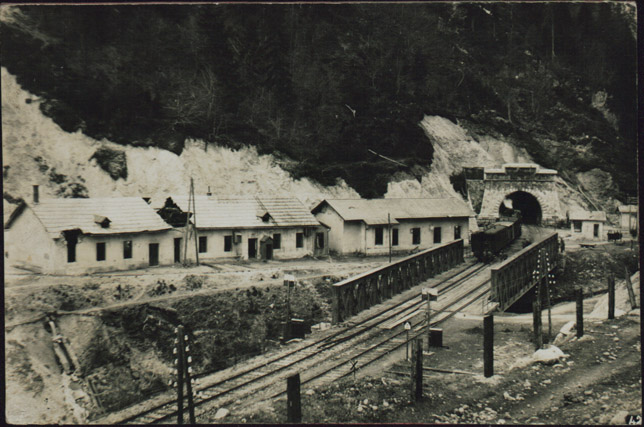 Karavanški železniški predor pri Podrožci.